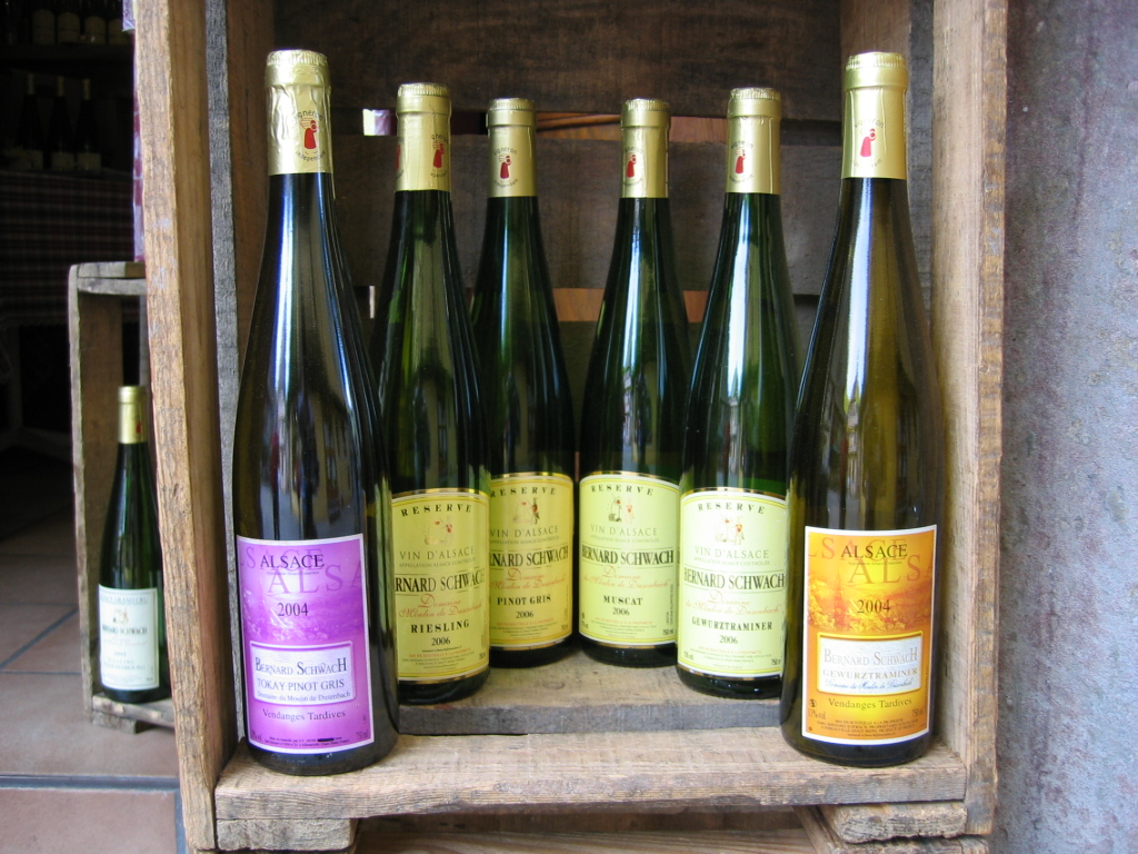 Riquewihr - Village de caractère - Alsace - France